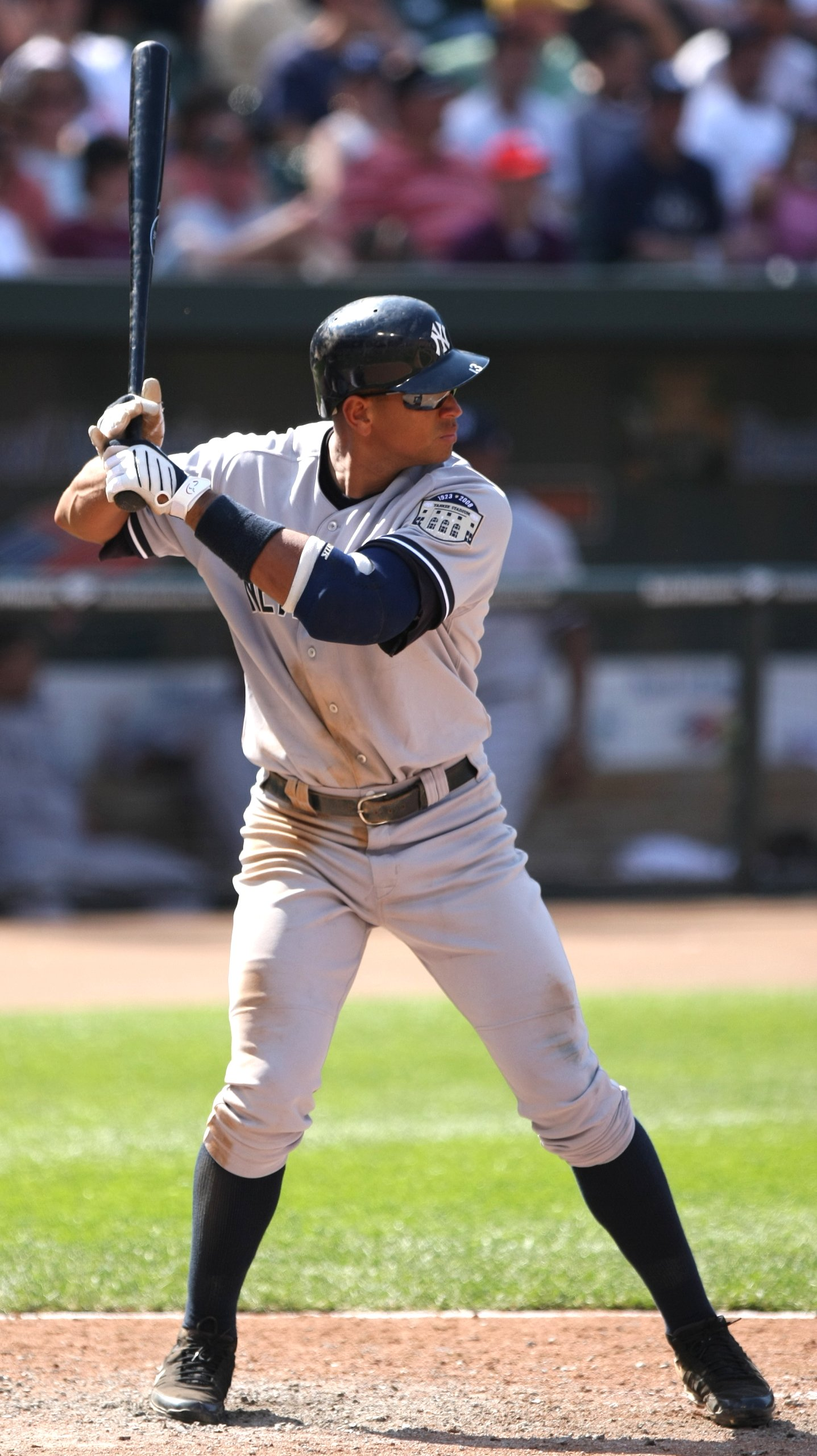 Alex Rodriguez in a game on 5/26/08